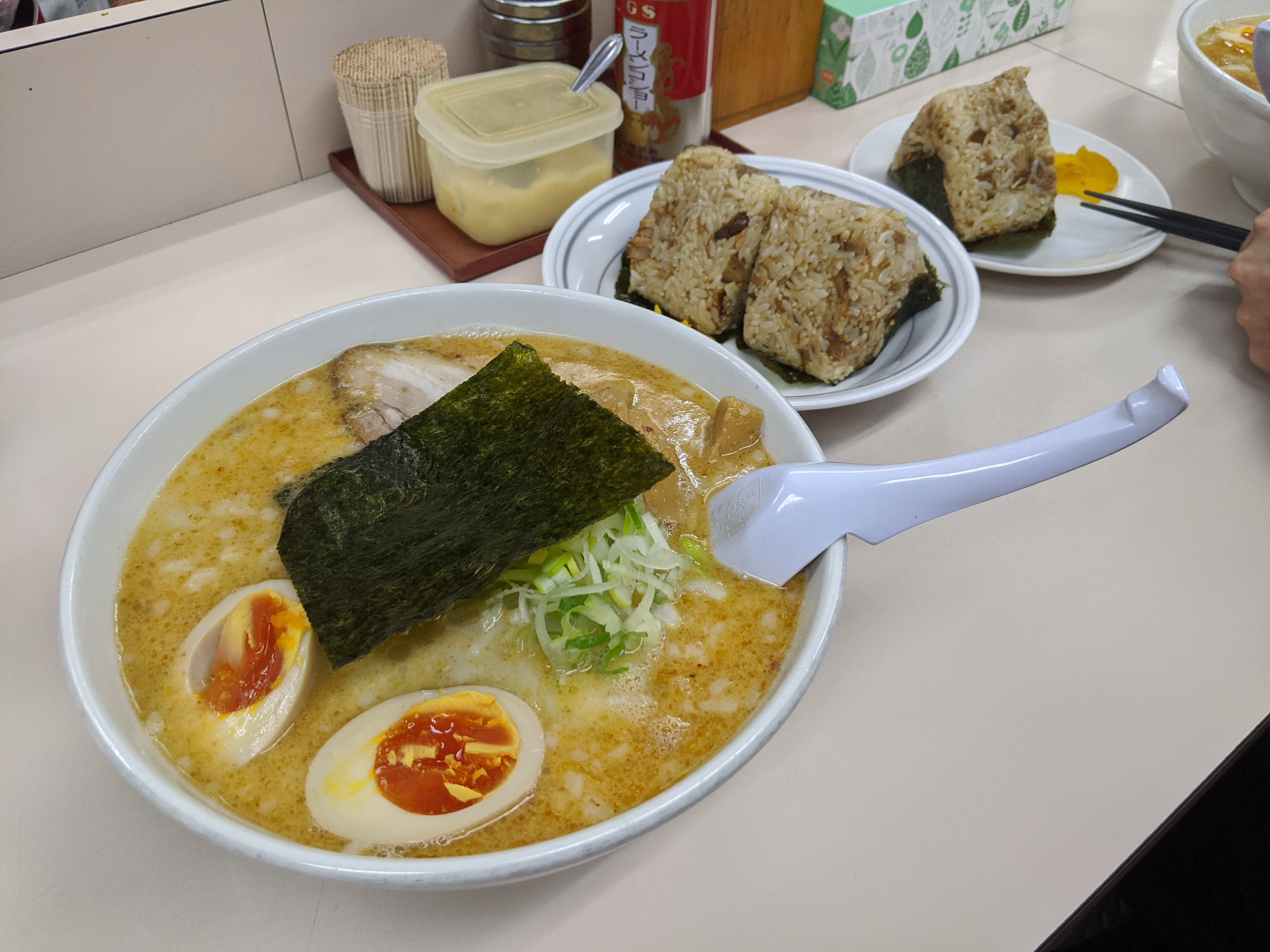 北海道札幌市のラーメン店「らーめん五丈原」のとんしおラーメンとチャーシューおにぎり